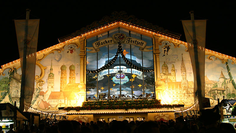 Hacker Festzelt (tent of the Hacker-Pschorr brewery)